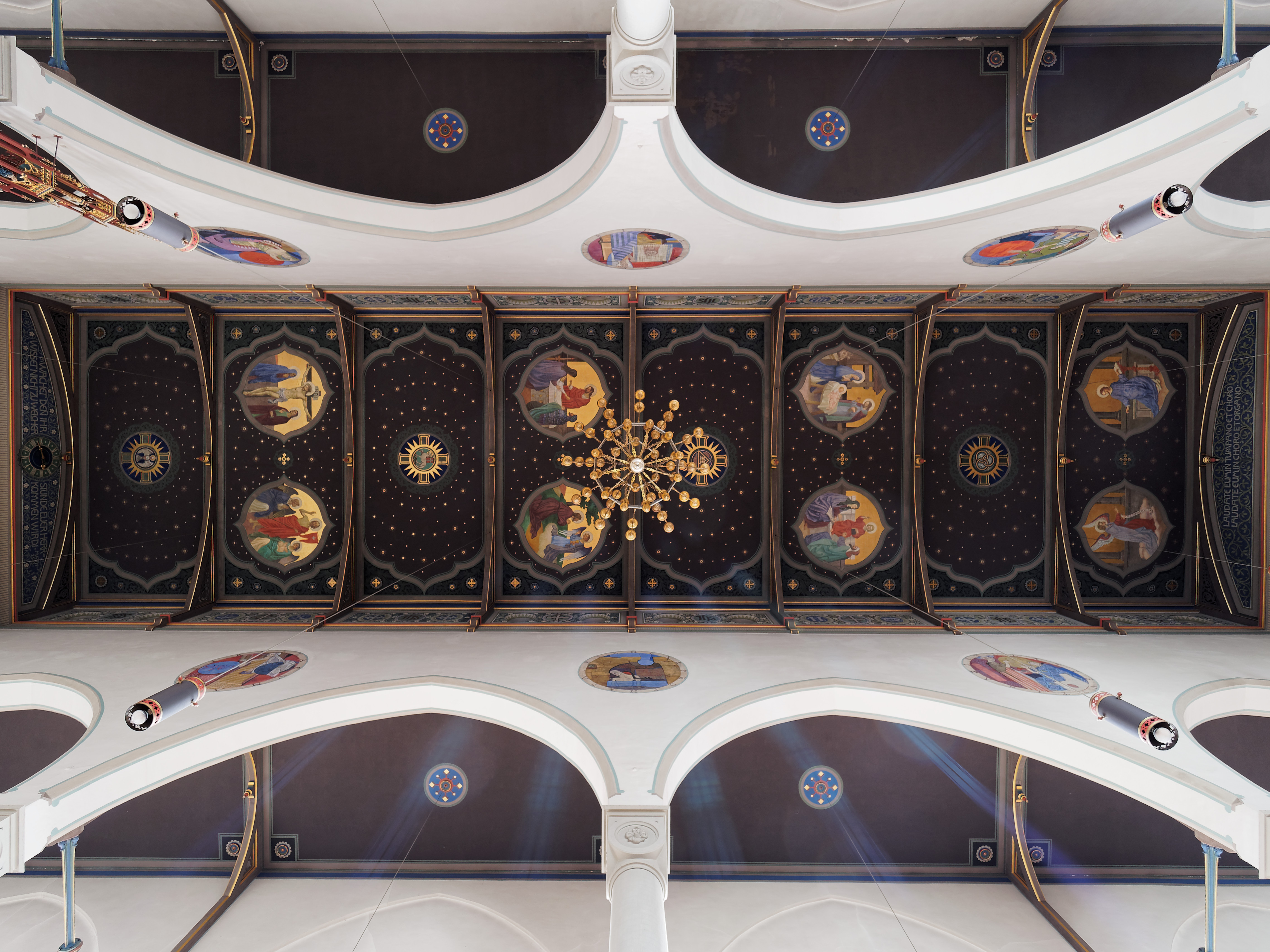 Oberstaufen St. Pater und Paul, Decke über dem Mittelschiff, bemalt mit Szenen aus dem alten Testament, Baudenkmal